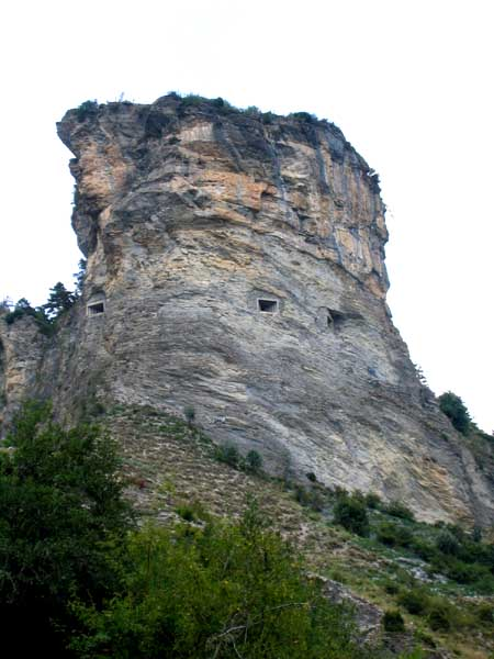 Alpenwall: Bunker num. 244 bei Tende. Ondřej Filip 2005 - selbst gemacht